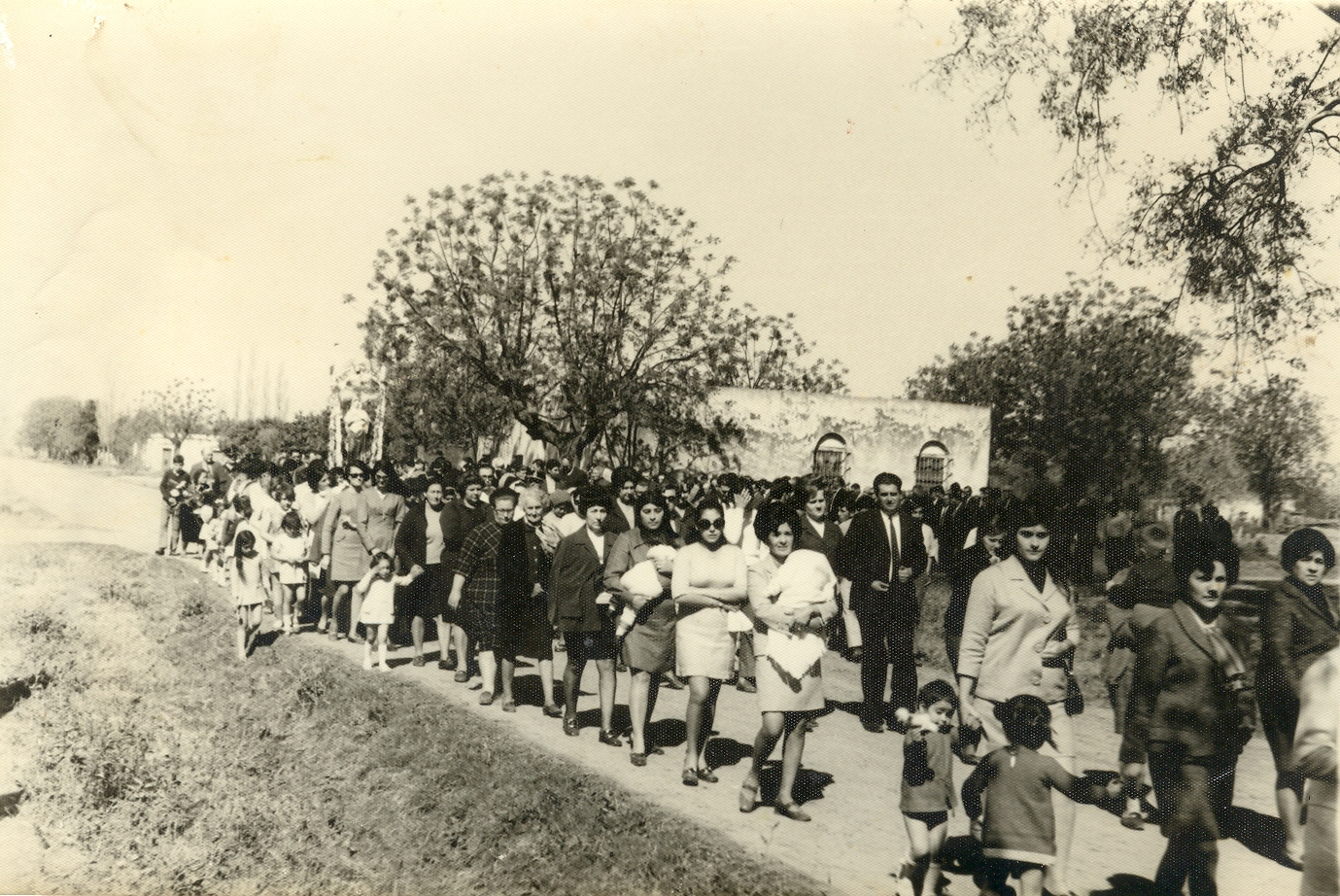 Procesión de fiestas patronales en honor a Nuestra Señora de los Dolores en Cayastacito.